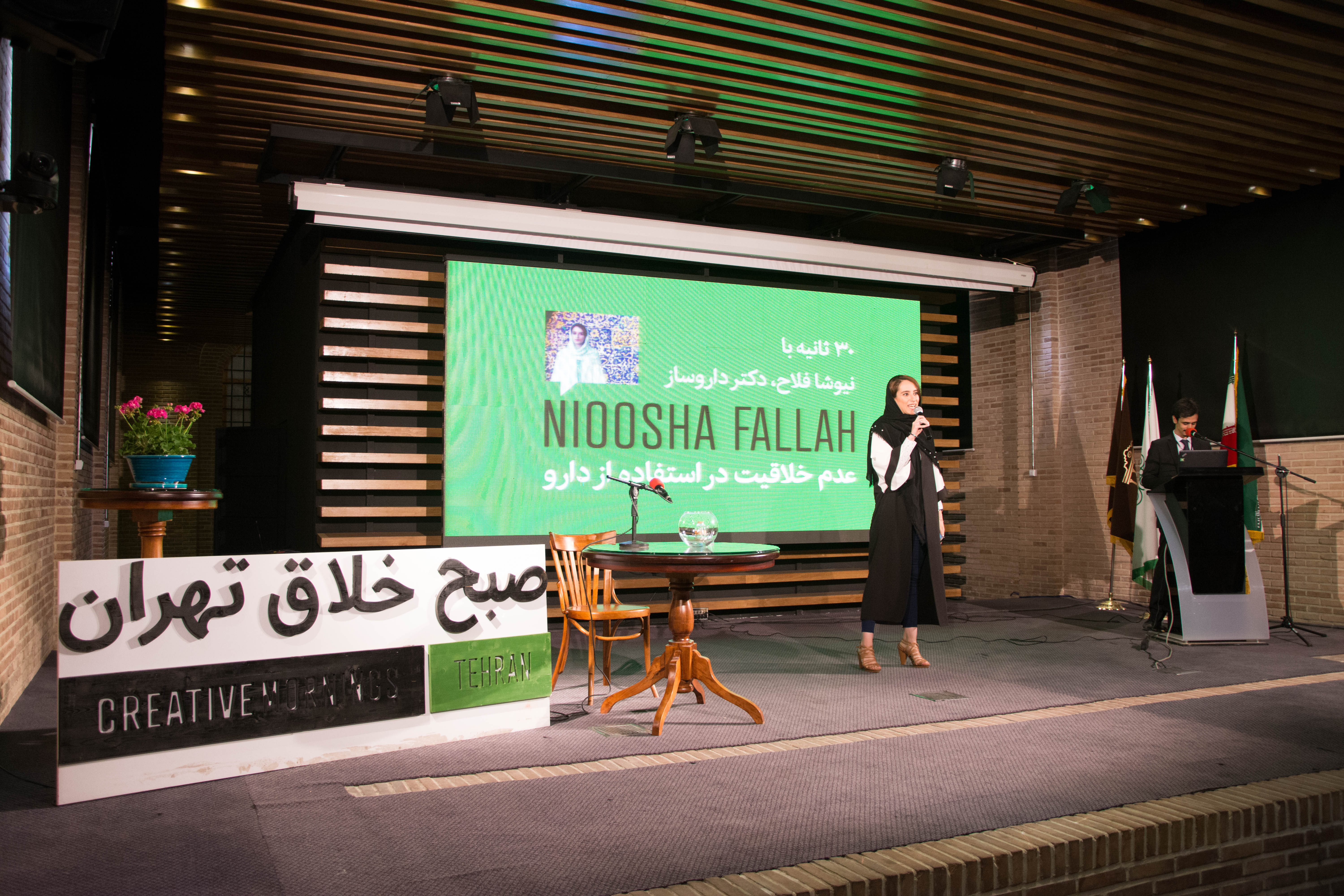 نمونه ای از بخش سخنرانی سی ثانیه‌ای در رویداد صبح خلاق تهران